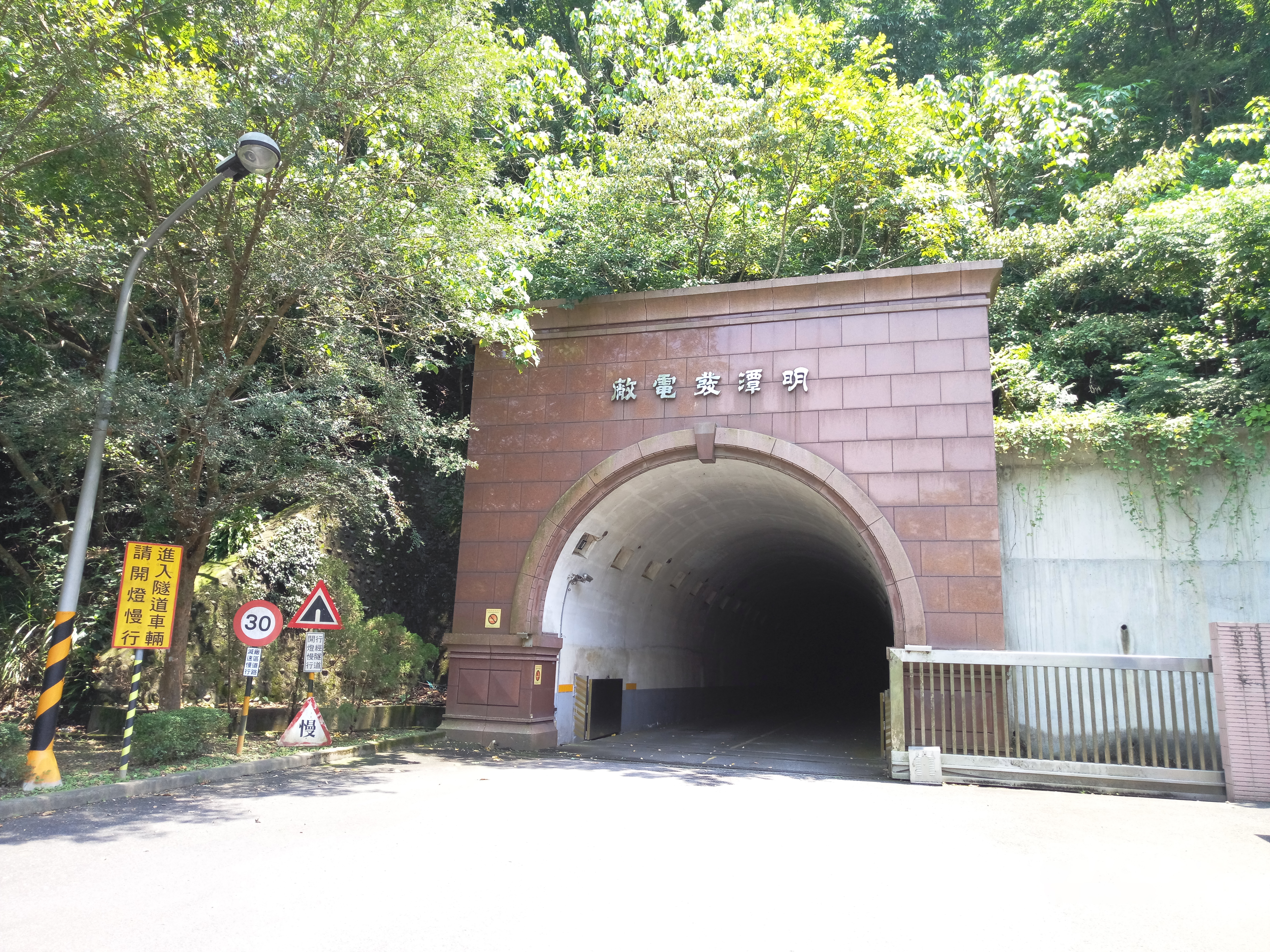 明潭發電廠抽蓄機組地下廠房通道入口